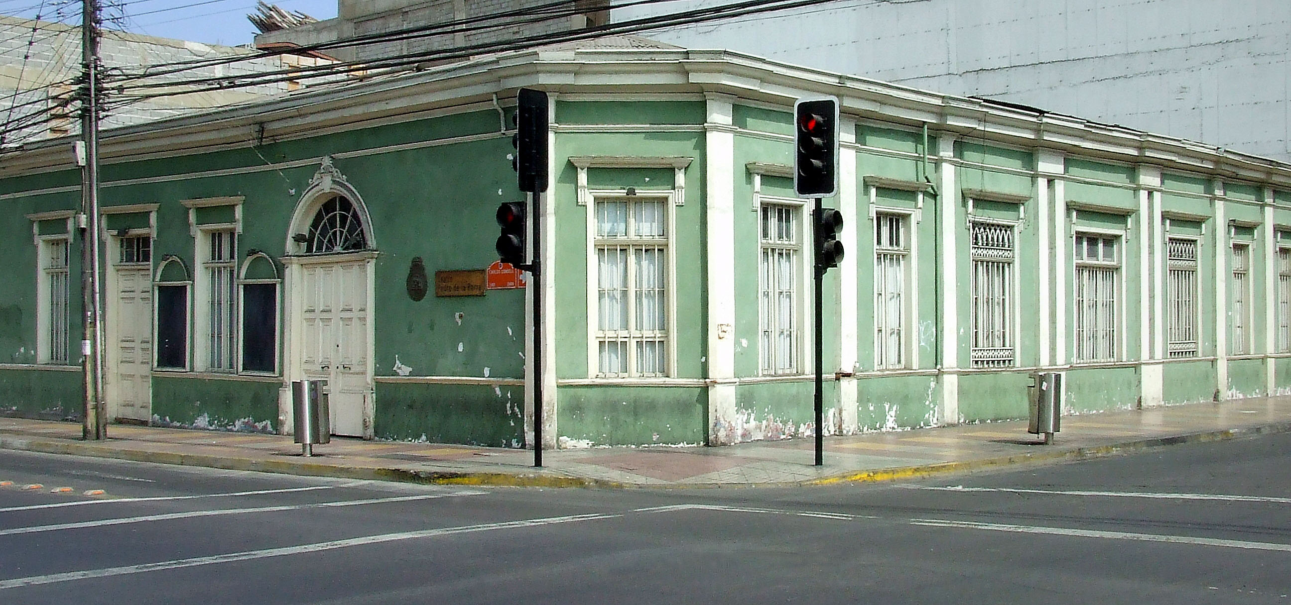 Escuela D-73 (ex Escuela N.º 2) This is a photo of a national monument in Chile: 1334